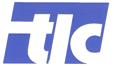 Logo de l'entreprise TLC